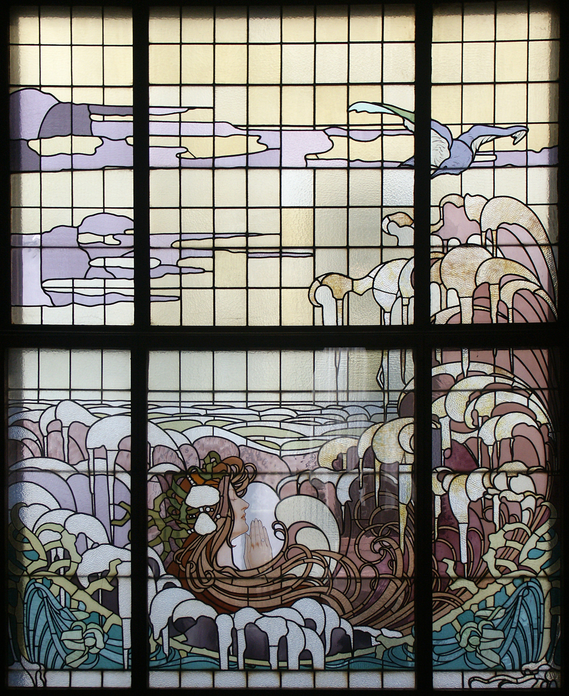 Vitrail de l'Hôtel Saintenoy, rue de l'Arbre Bénit 123, Ixelles (Bruxelles), Belgique)